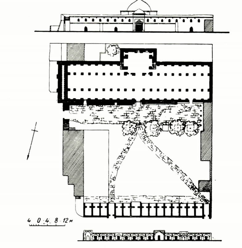 Dərbənd Cümə məscidinin planı